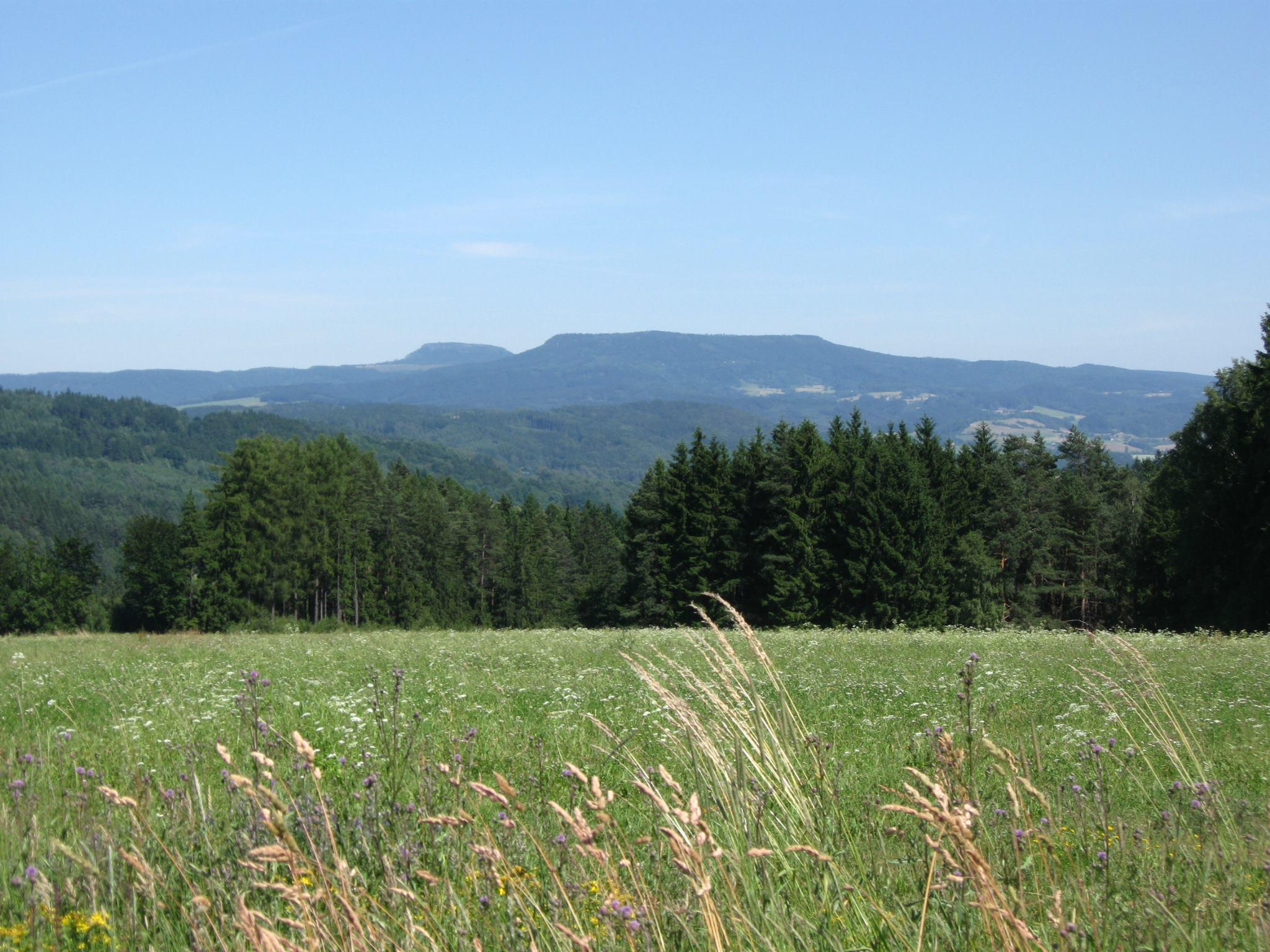 Bor vpravo vpředu, vlevo za ním Hejšovina; pohled přes Hronovskou kotlinu a Jestřebí hory (táhnoucí se vpředu zleva)